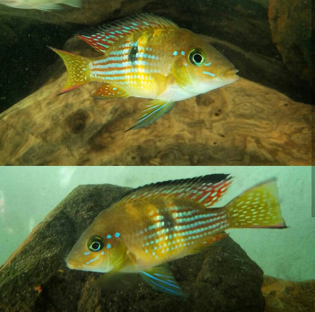 Cíclido autóctono de Uruguay, laguna Parque Roosevelt Montevideo.